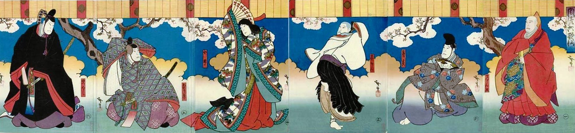 広貞「風流六歌仙」、中判6枚揃錦絵